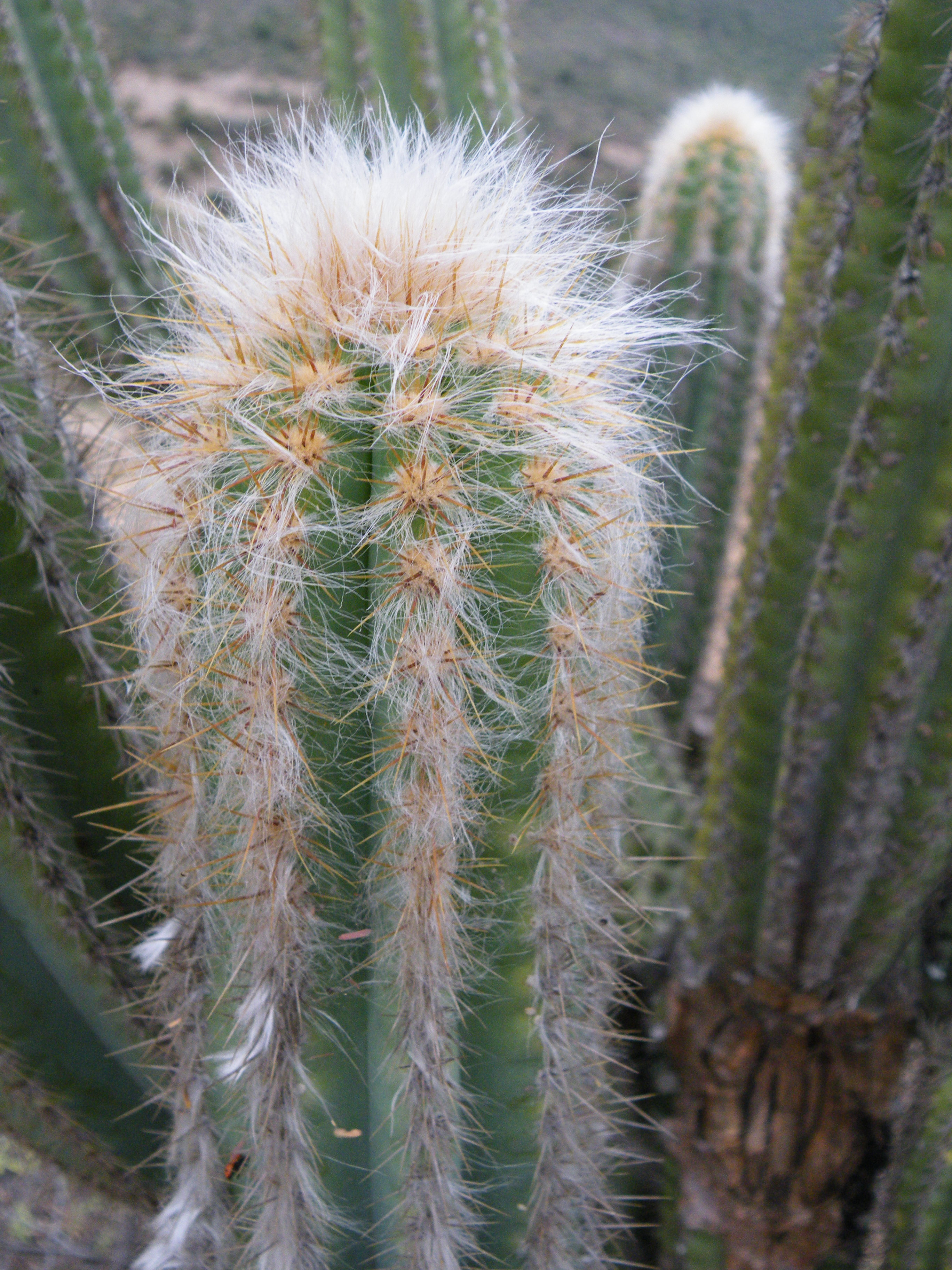 West point 109, Oaxaca